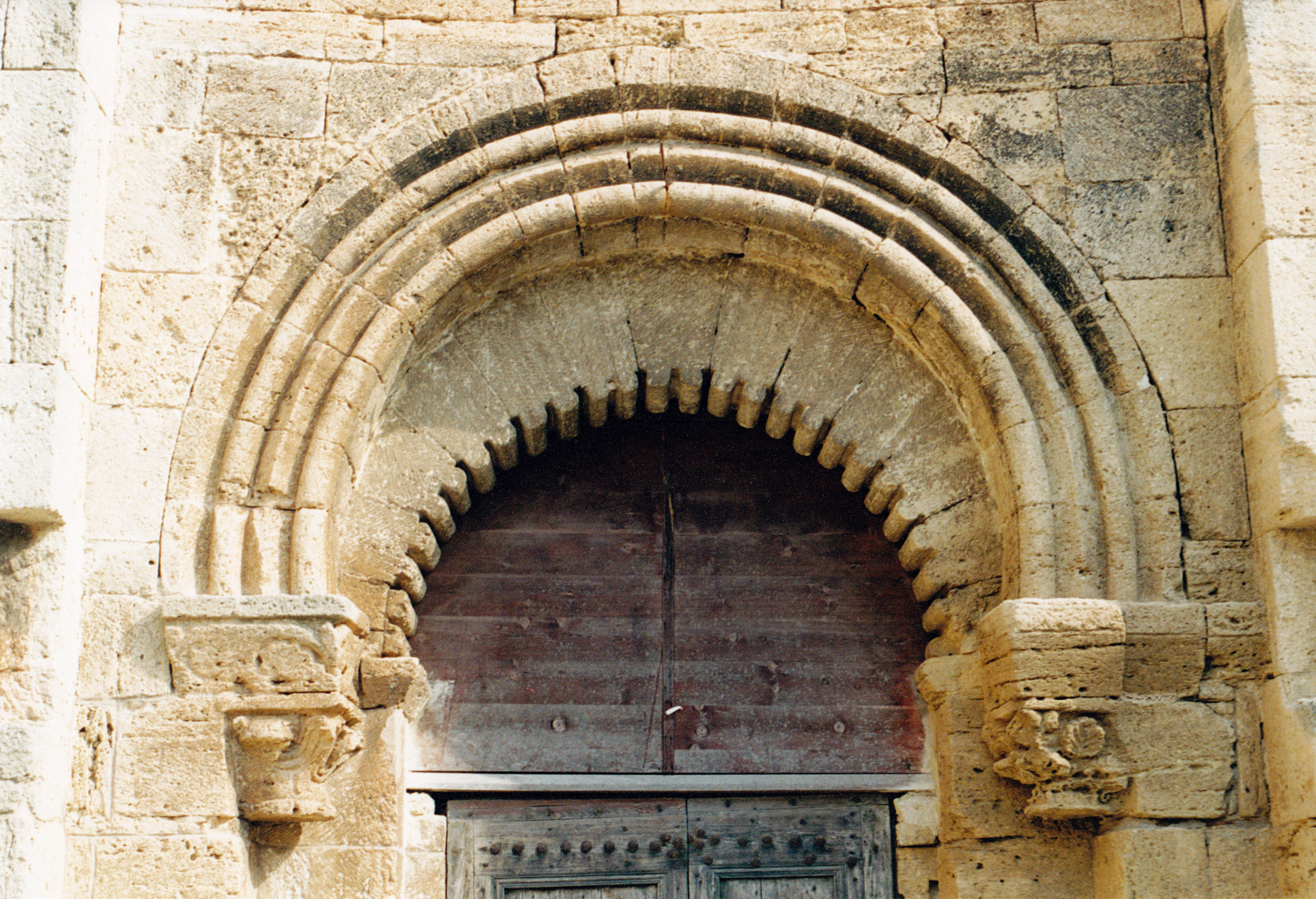 Loupian (Hérault - Languedoc) - Chapelle St Hippolyte - arc festonné surmonté d'un arc outrepassé